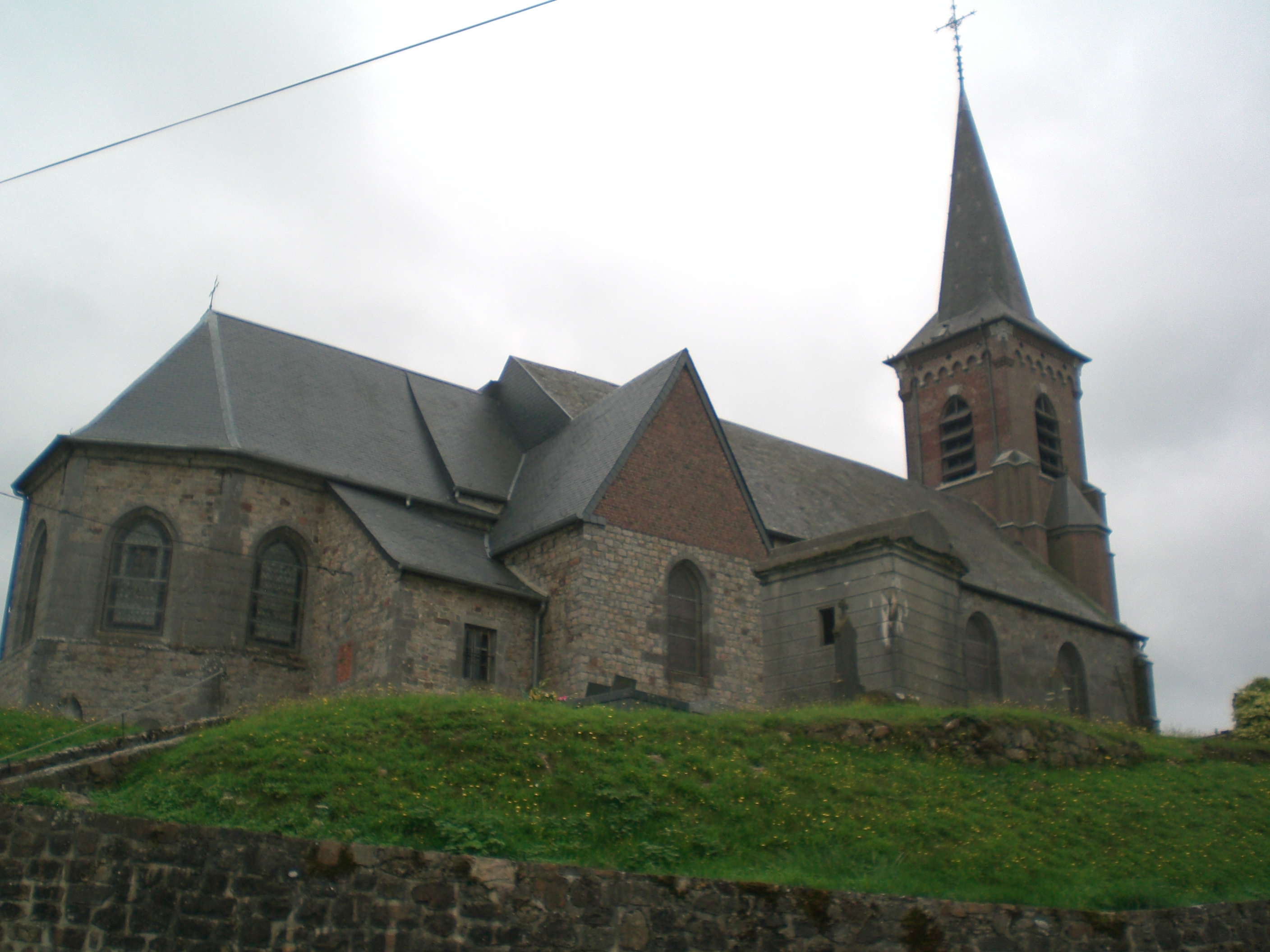 eglise de ramousies